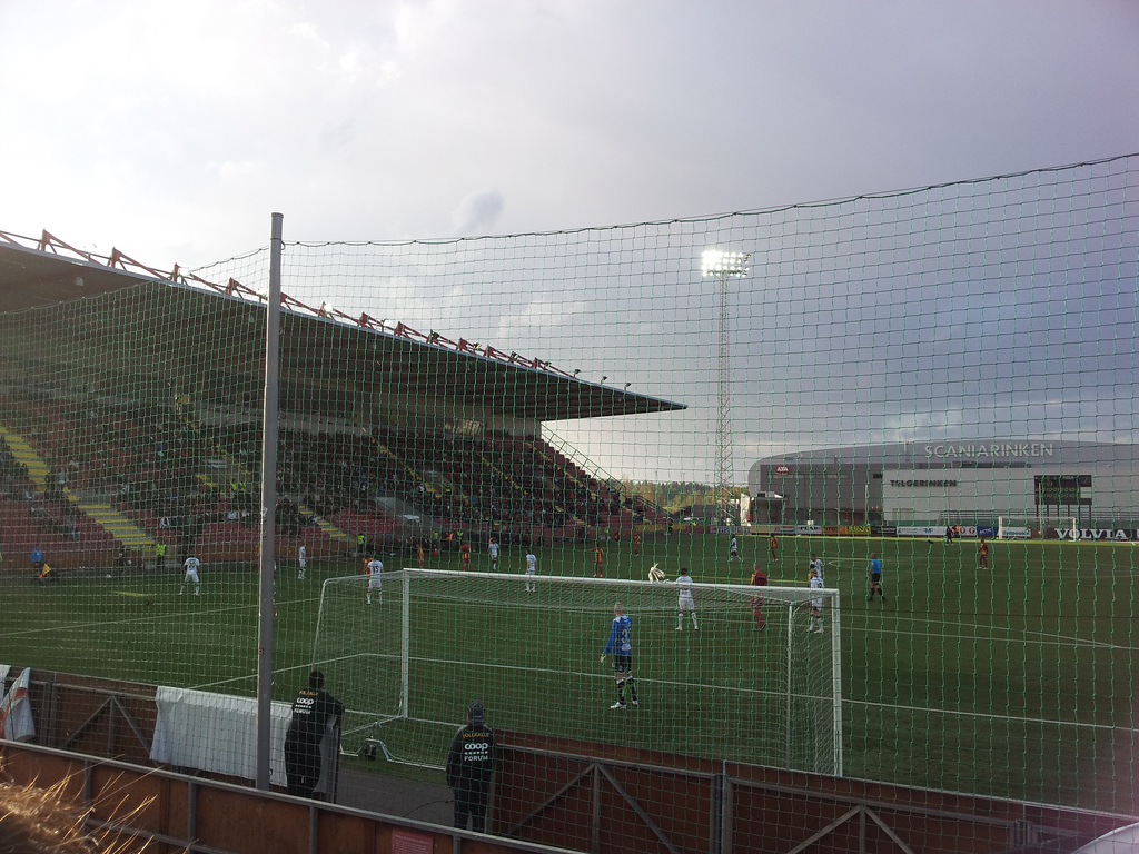 Södertälje Fotbollsarena ("Jallavallen") i Geneta vid en match mellan Syrianska FC och GAIS. Vy från södra läktaren (bortasektionen). I bakgrunden Scaniarinken.